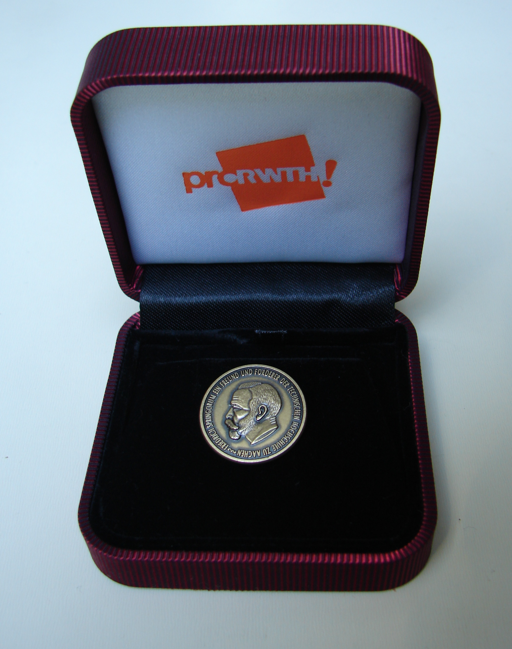 Springorum-Denkmünze in der Schatulle, in der sie überreicht wurde.